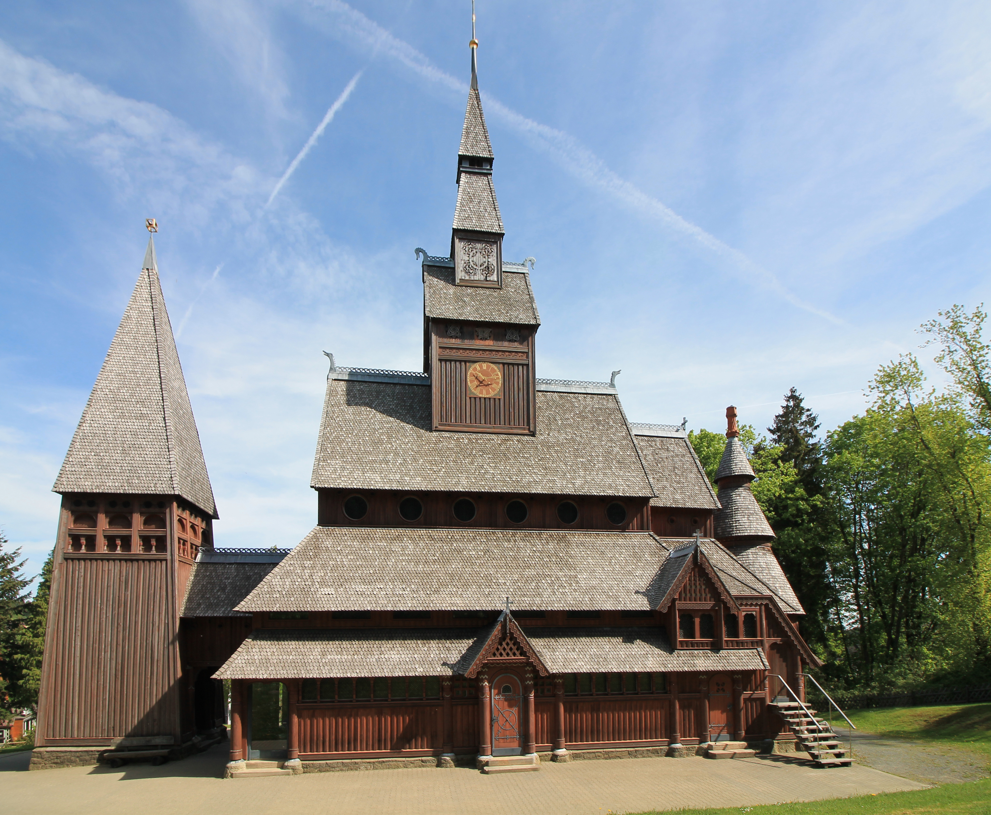 Gustav-Adolf-Stabkirche in Hahnenklee, Blick nach Norden. Hahnenklee-Bockswiese, Niederschsen, Deutschland.